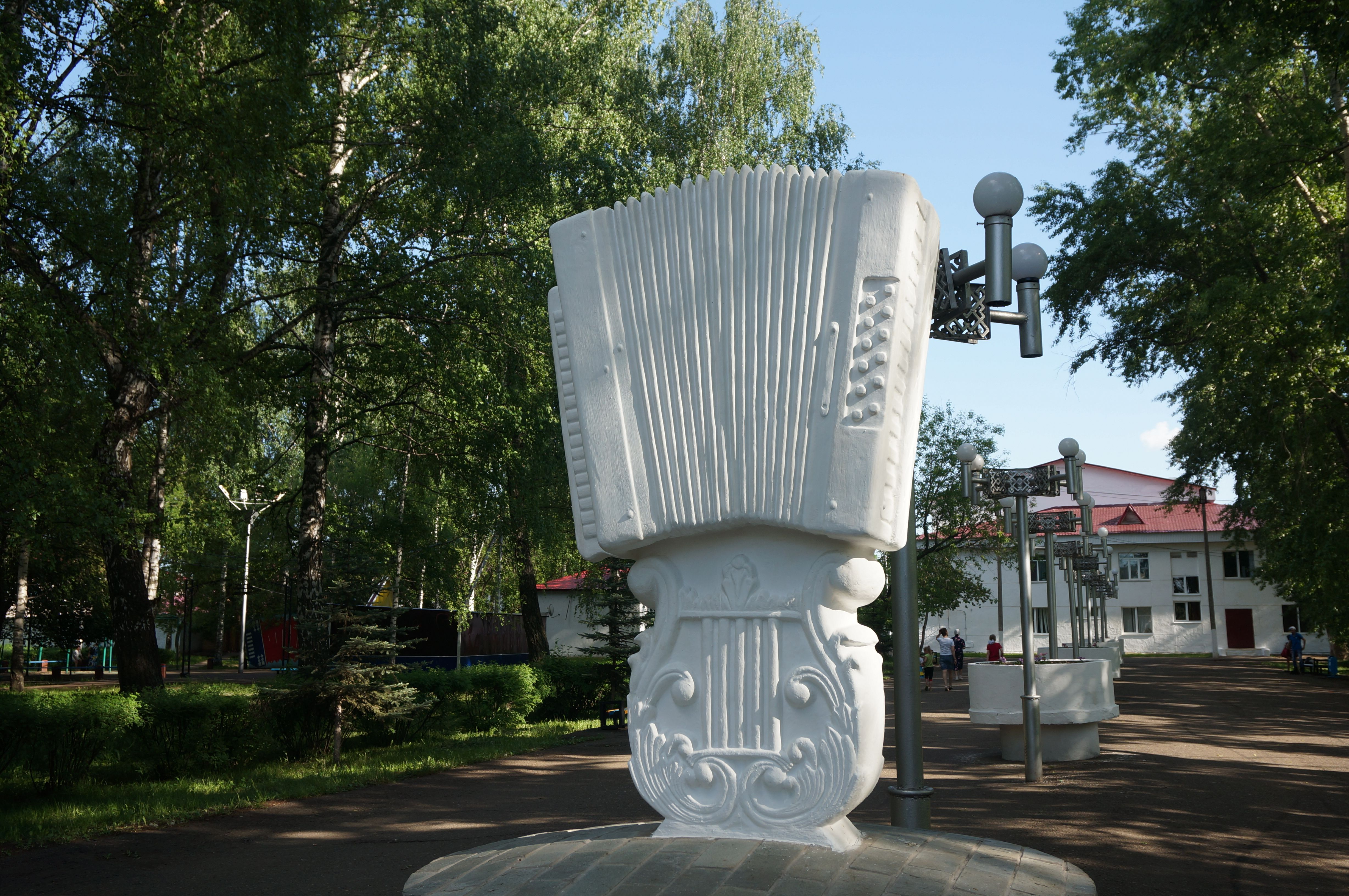 Башҡортса: Яңауылда гармунға ҡуйылған һәйкәл. Анса Нуртдинов архивынан